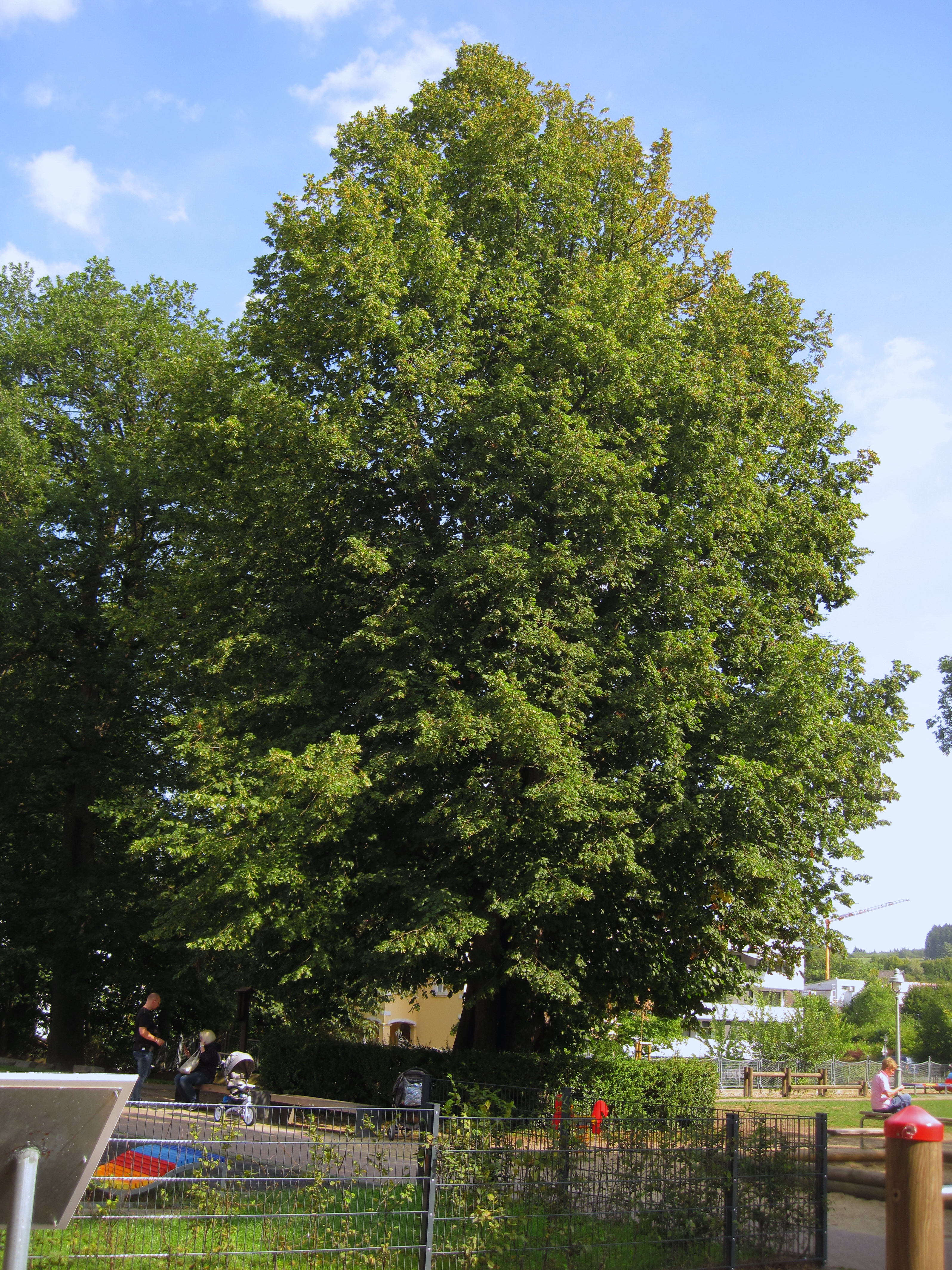 Gerichtslinde im Stadtgarten in Neuenrade. Naturdenkmal, über 900 Jahre alt.